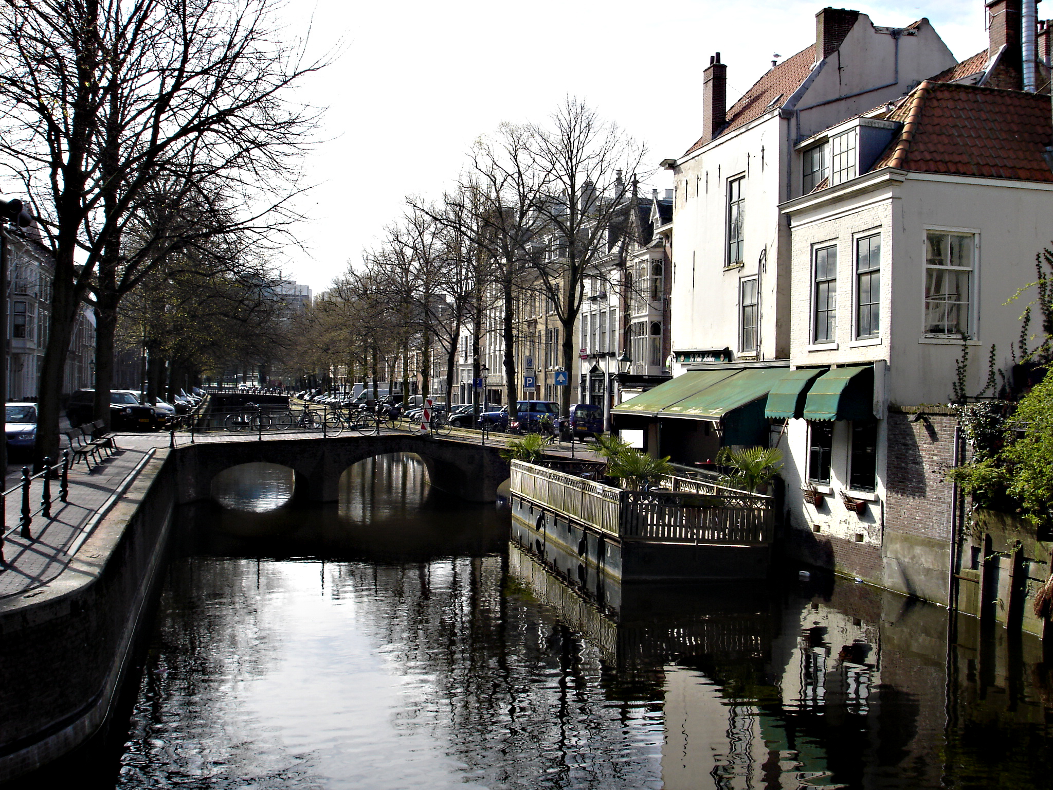 [GW 46] Malibrug Smidswater Den Haag